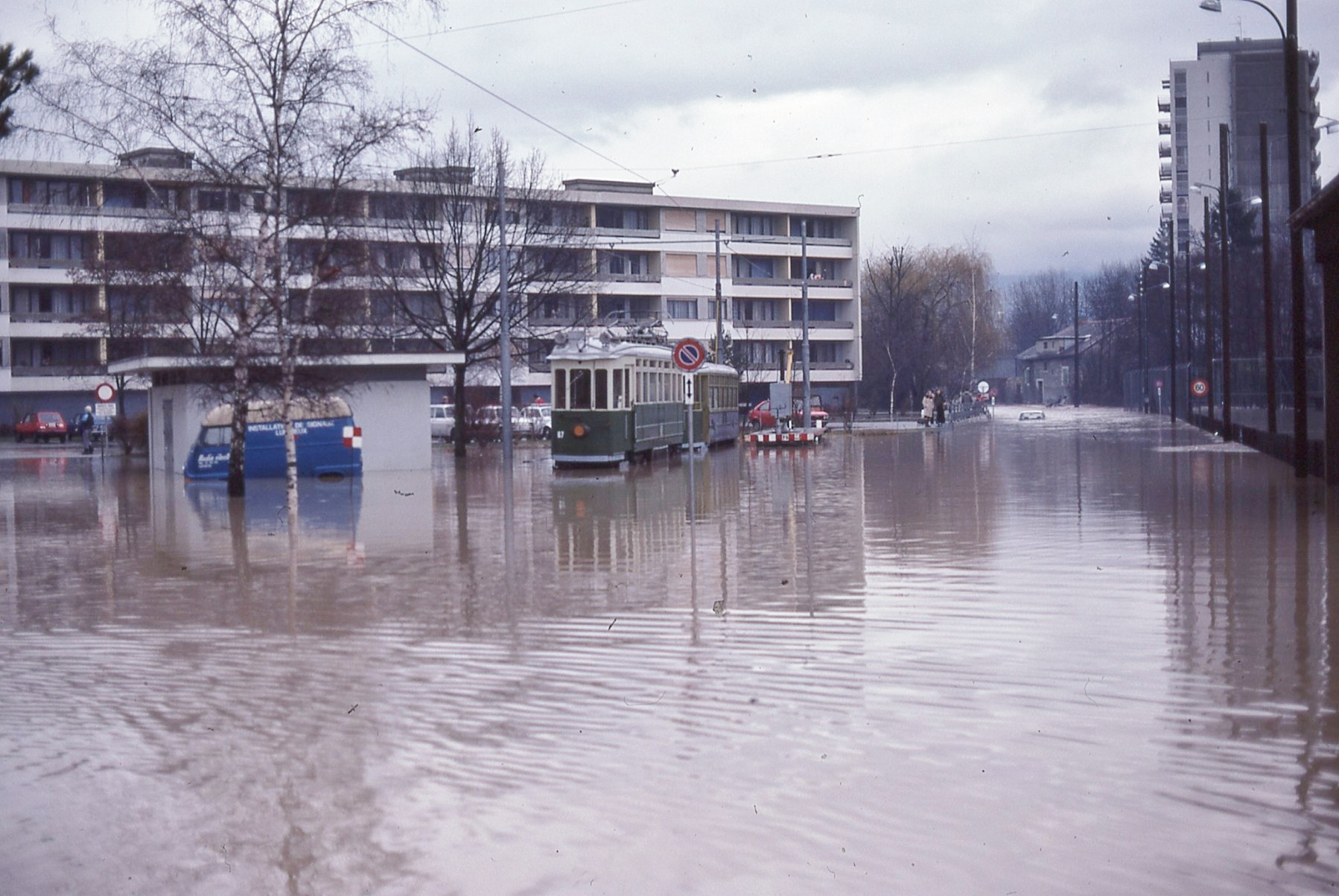 Photo. Trams aux Fils. Tram 67 et remorque 363 de l'A.G.M.T. Dans les années 1973 à 1988 (environs) la composition A.G.M.T. était garée à Moillesulaz sur cette voie de garage et malheureusement le 28-01-1979, la rivière Foron a débordé et la composition c'est retrouvée dans cette situation. Suite à cet incident, trois moteurs de la motrice 67 ont été changés par des moteurs de réserve